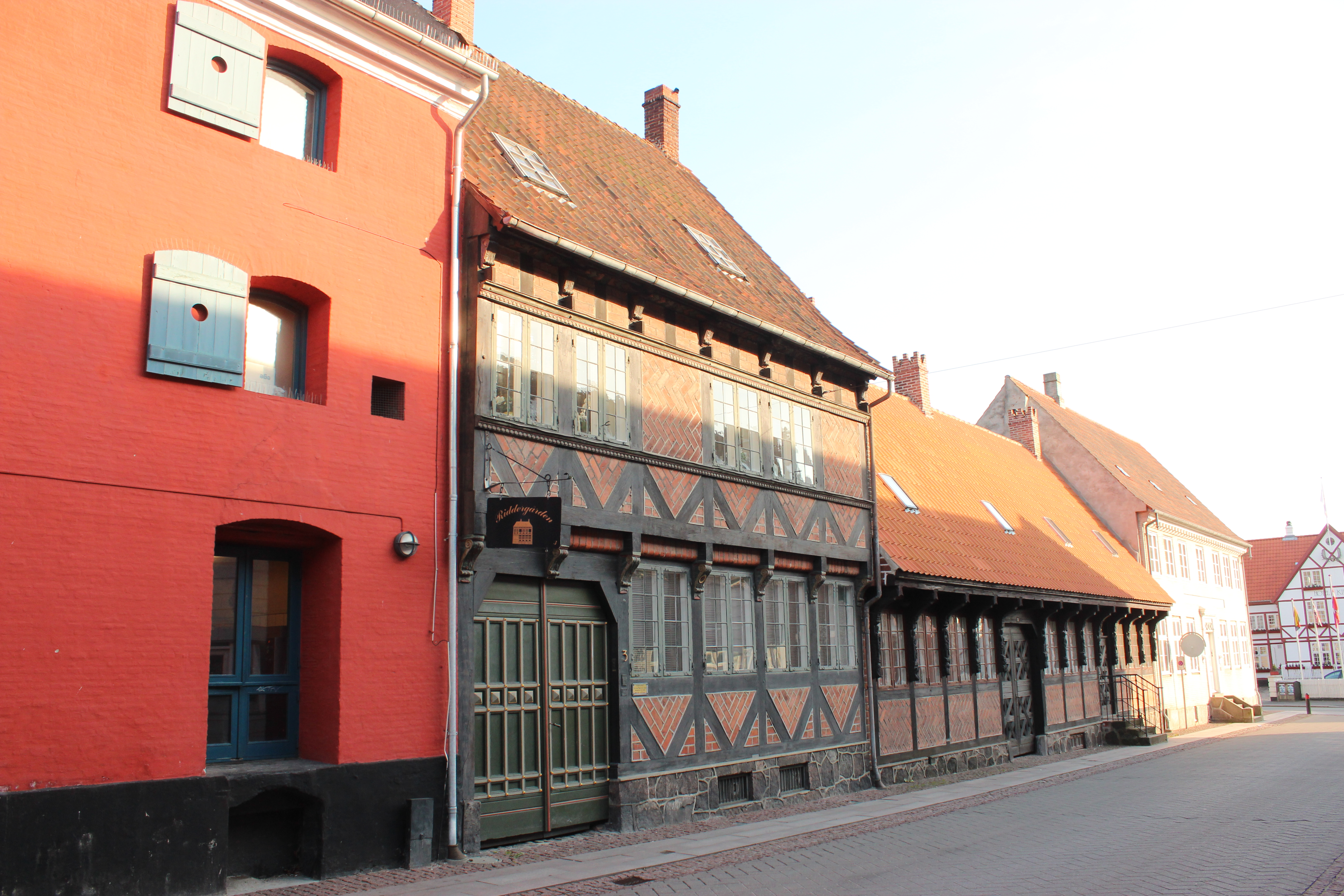 I Riddergade, Næstved